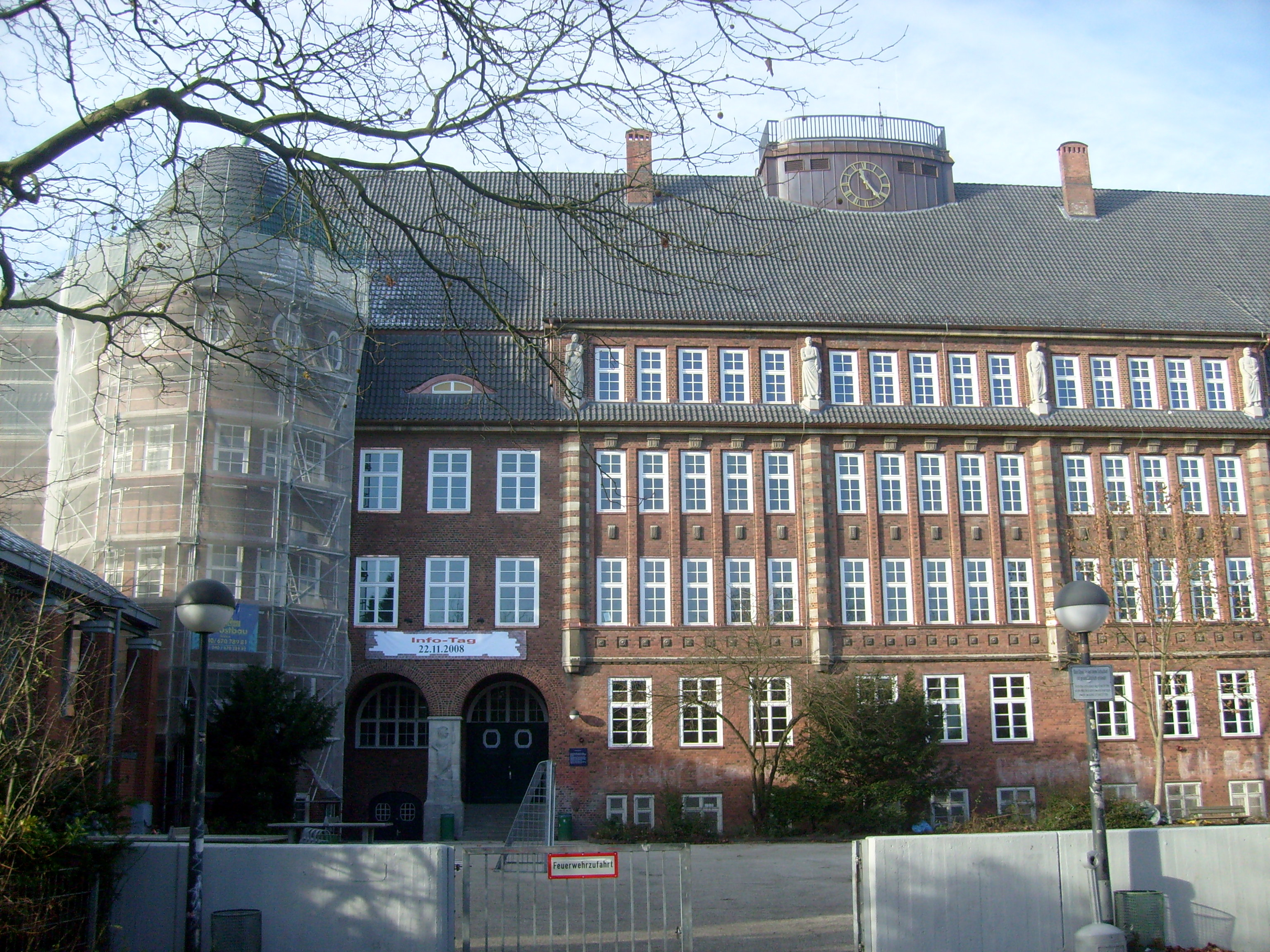 Das Hansa-Gymnasium in Hamburg-Bergedorf. Ein Gebäude von Prof. Fritz Schumacher, erbaut 1912-1914